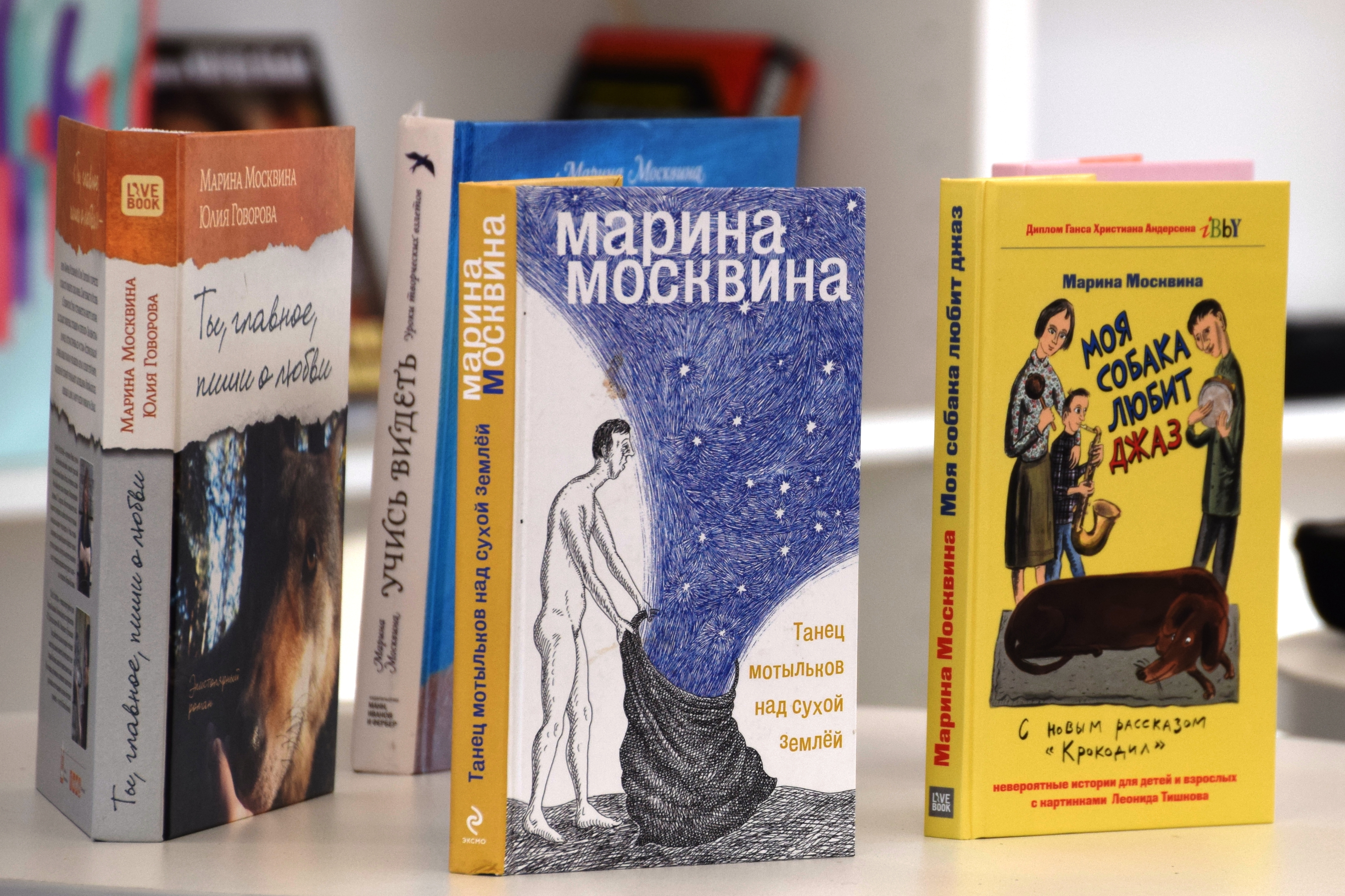 Фото: Александр Шинкаренко